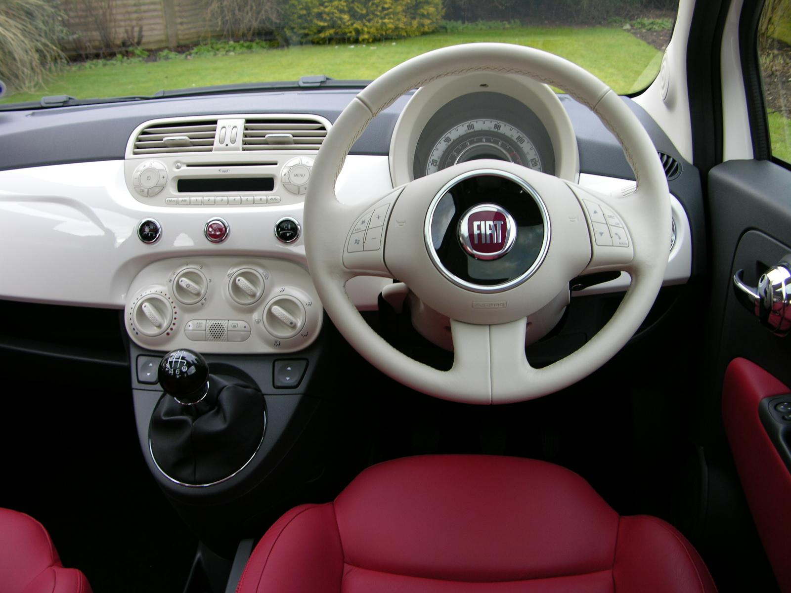 2008 FIAT 500 1.4 Lounge.